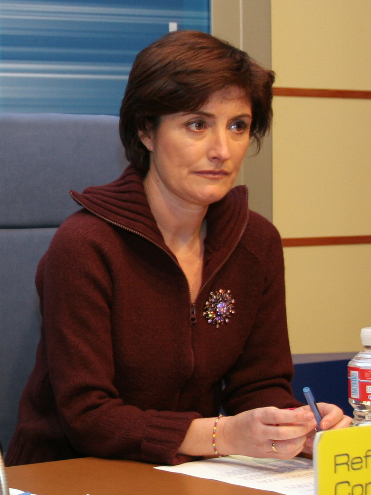 El consejero de Presidencia, Ordenación del Territorio y Urbanismo, José Vicente Mediavilla, informa, en rueda de prensa, sobre la corrida de toros benéfica a favor de las familias de las víctimas del Nuevo Pilín